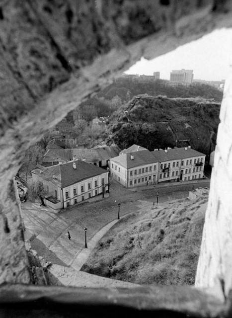 Building of Karas Gallery in 1983